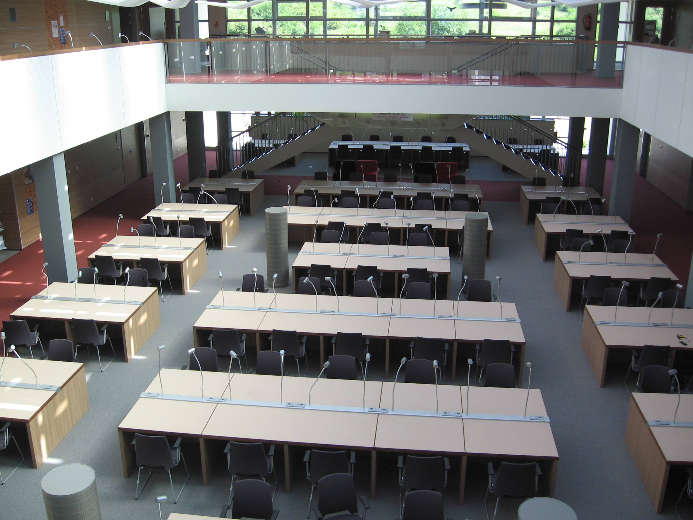 Wnętrze Biblioteki Uniwersyteckiej w Kielcach